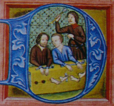 Věz%nové v kládě a nad nimi soudní biřic